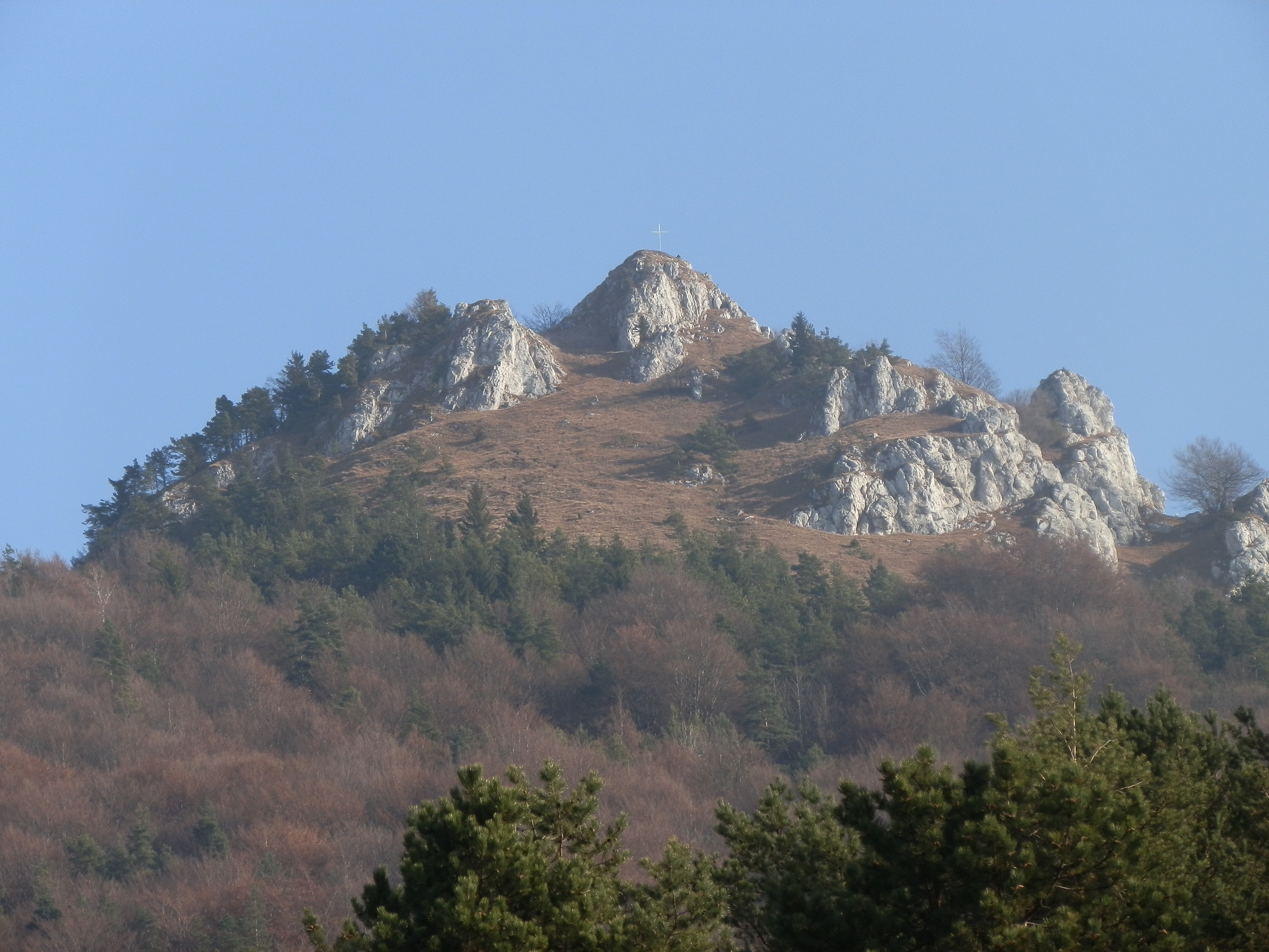 Vapeč z Hornej Poruby